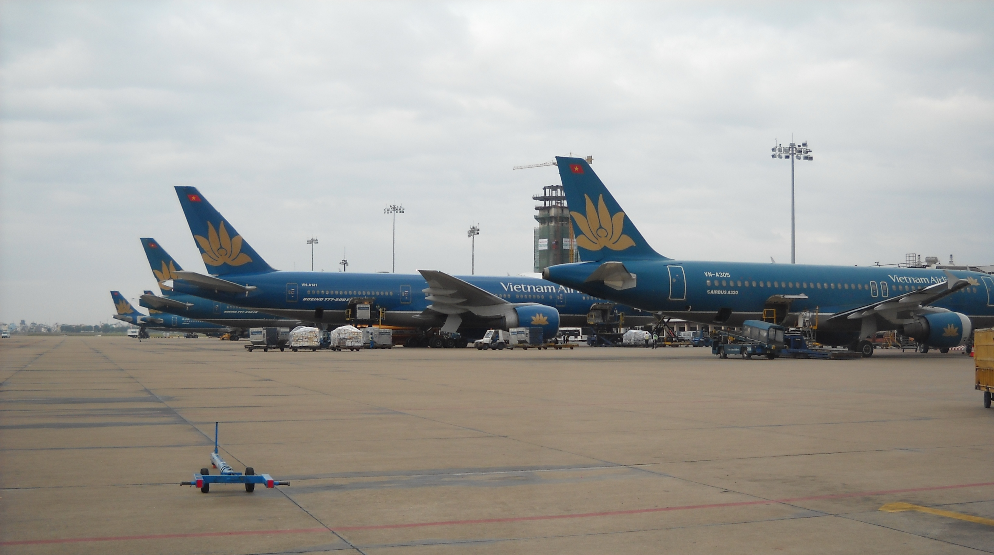 Vietnam Airlines aircraft at Tan Son Nhat International Airport